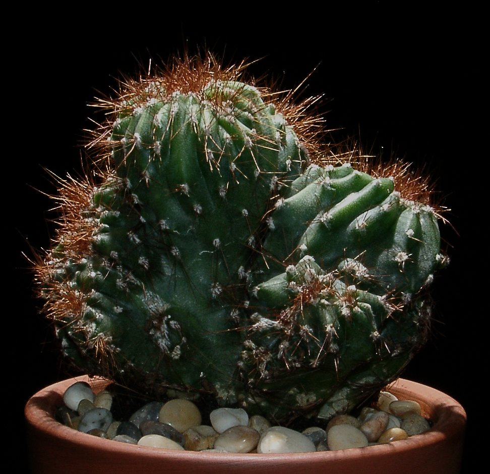 Cereus jamacaru f. monstrosus